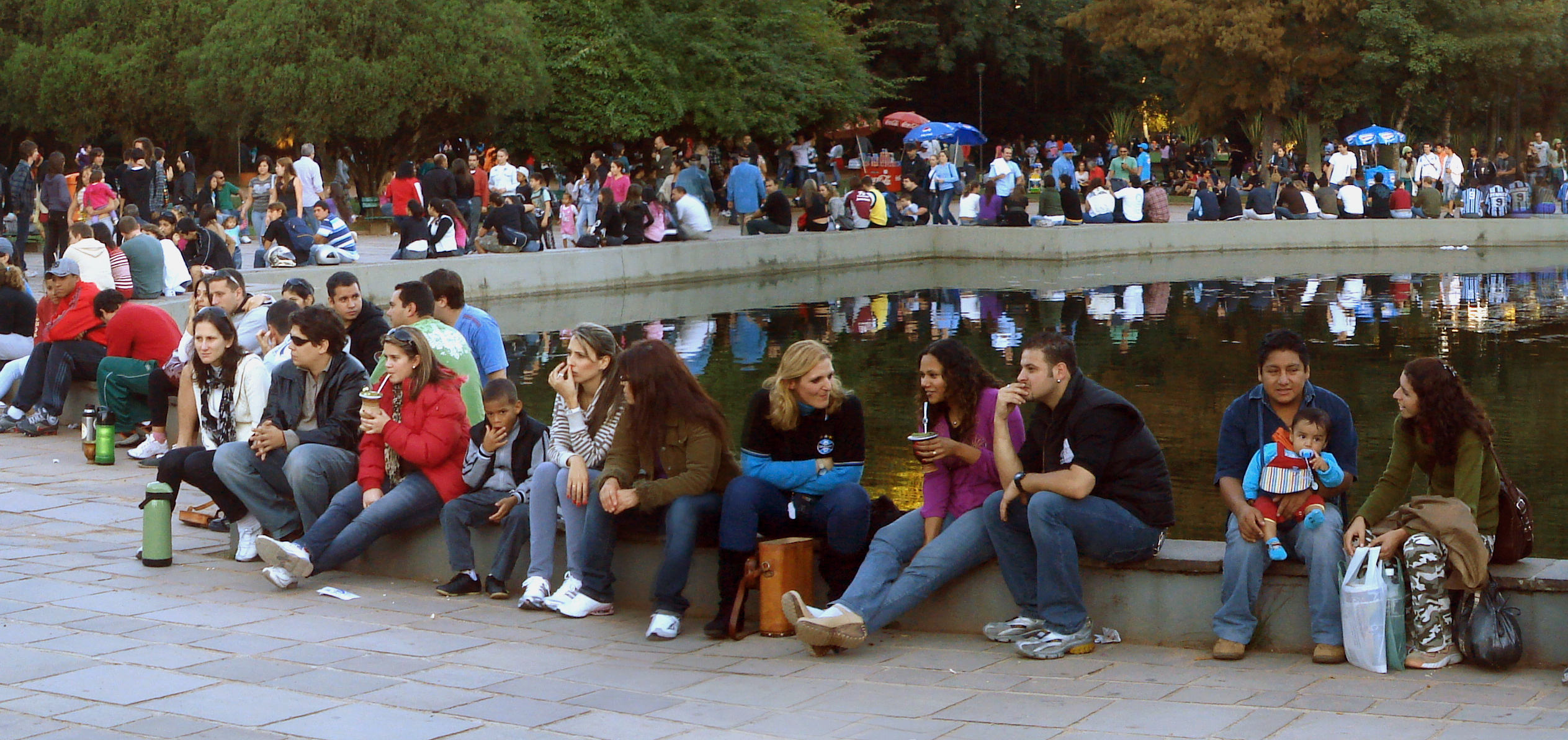 Pessoas no Parque Farroupilha